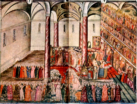 Коронование царя Михаила Феодоровича в Успенском соборе